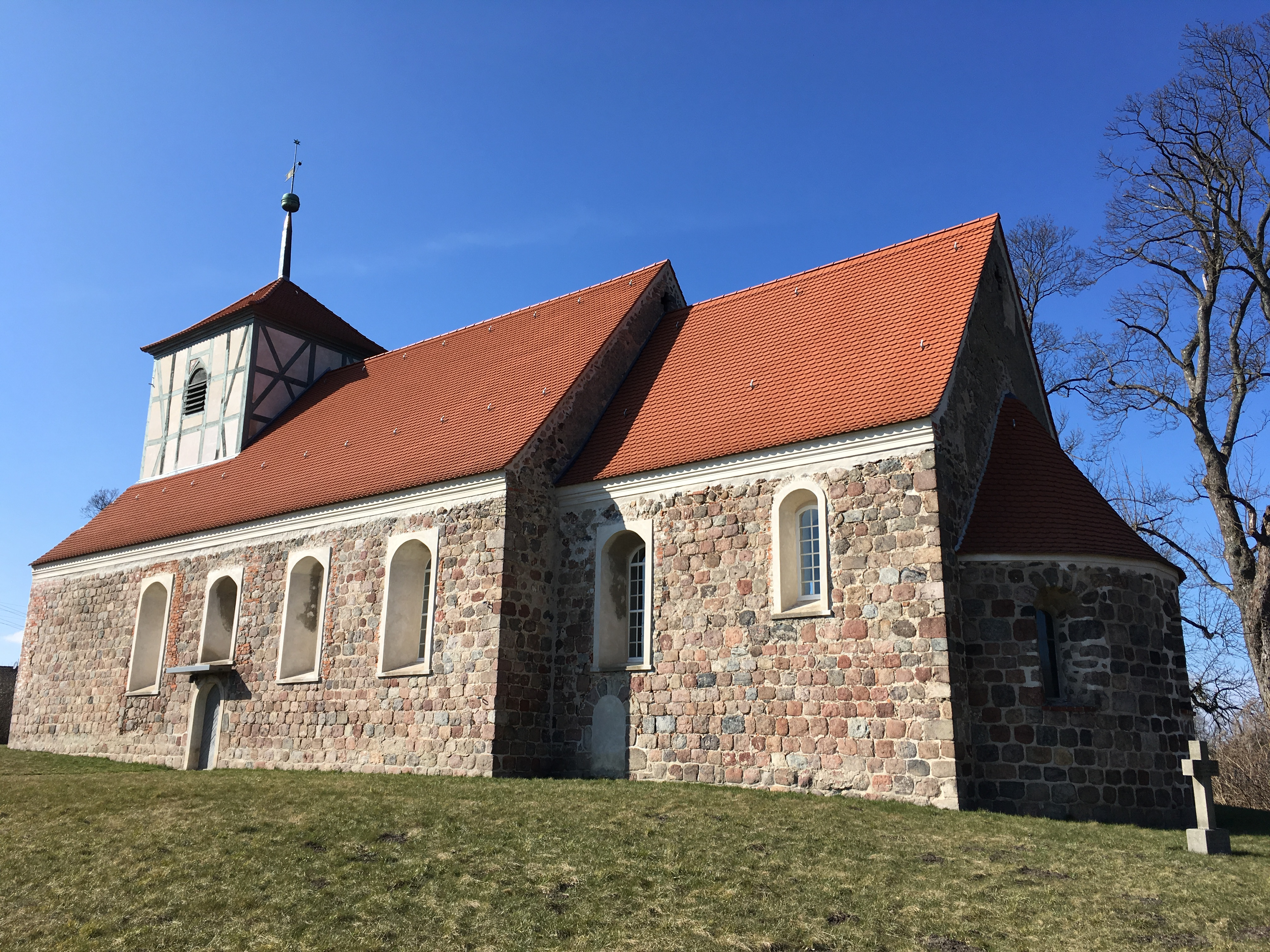 Die Dorfkirche Gielsdorf ist eine Feldsteinkirche aus dem 13. Jahrhundert in Gielsdorf, einem Ortsteil der Stadt Altlandsberg im Landkreis Märkisch-Oderland in Brandenburg. Im Innern steht unter anderem ein Altarretabel aus der Zeit um 1500.